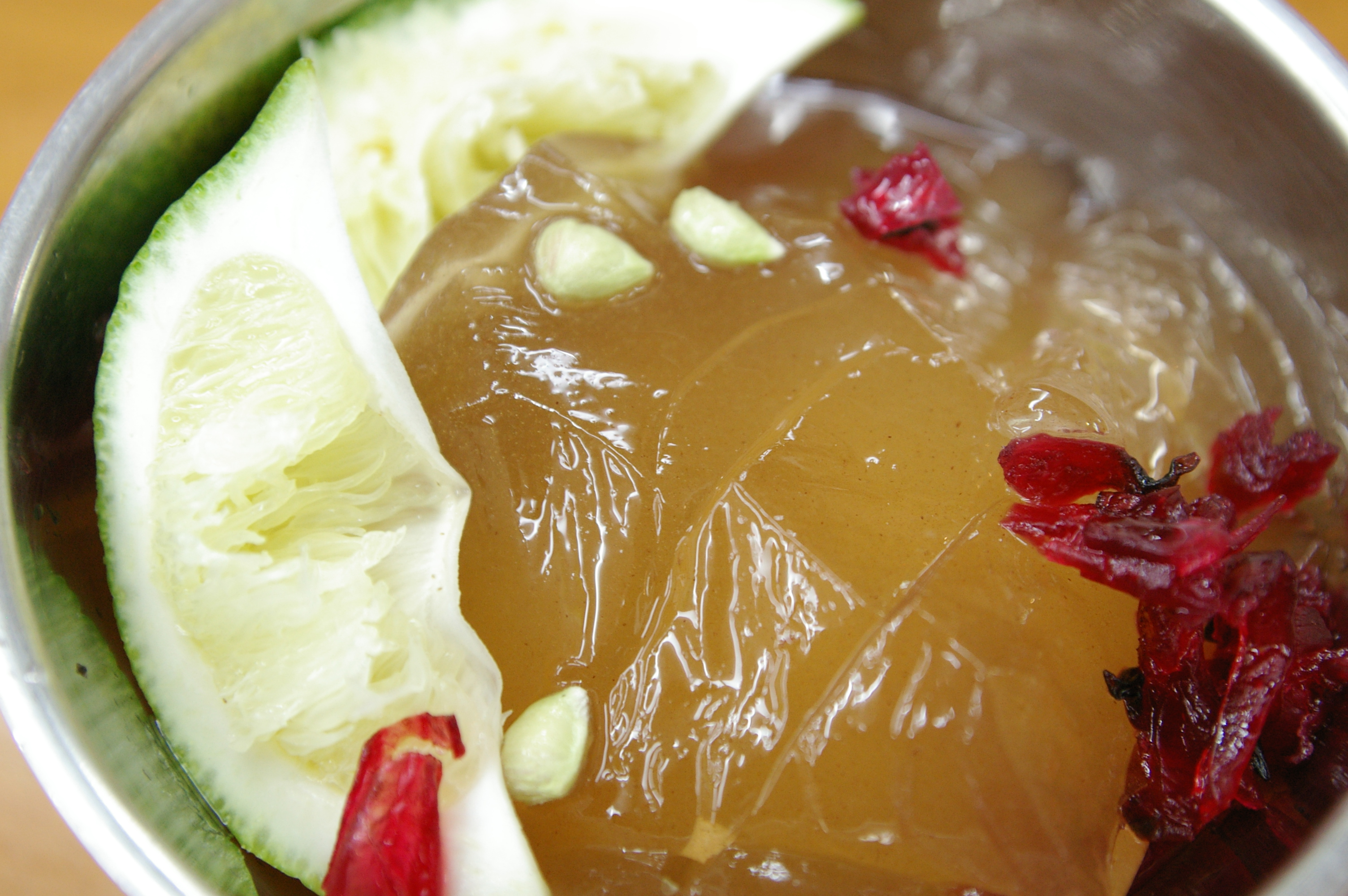 再加上一點檸檬原汁...感動呀標準組合